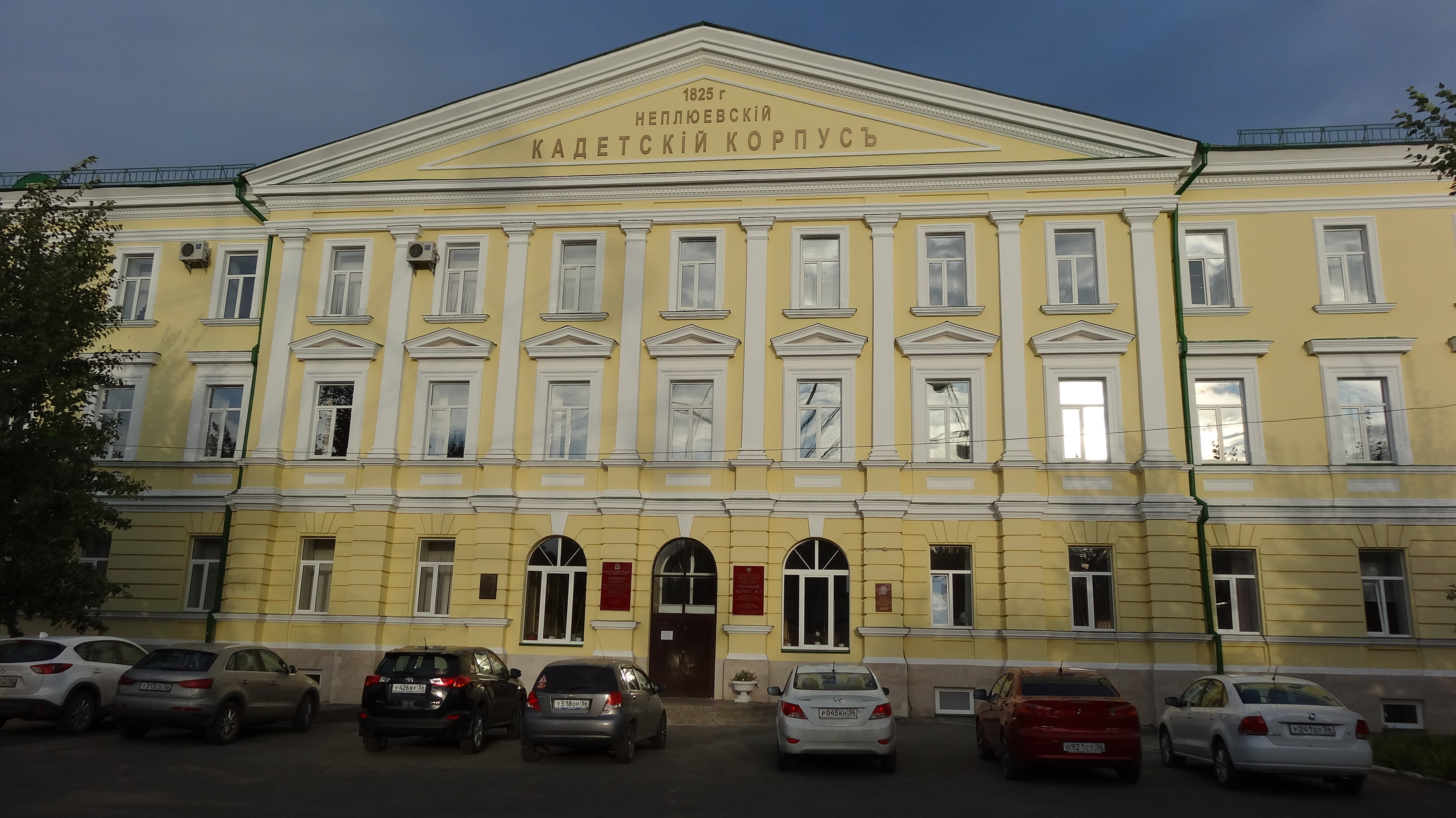 1-й Неплюевский Кадетский корпус (главное здание) (Оренбургская область, Оренбург, Парковый пр., 7)